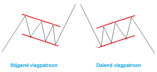 Vlagpatroon in de koersgrafiek. Technische analyse.